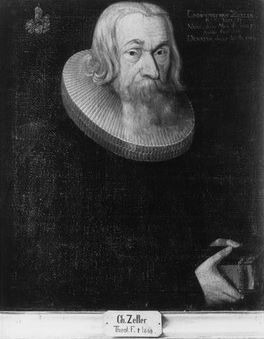 Gemälde in der Tübinger Professorengalerie